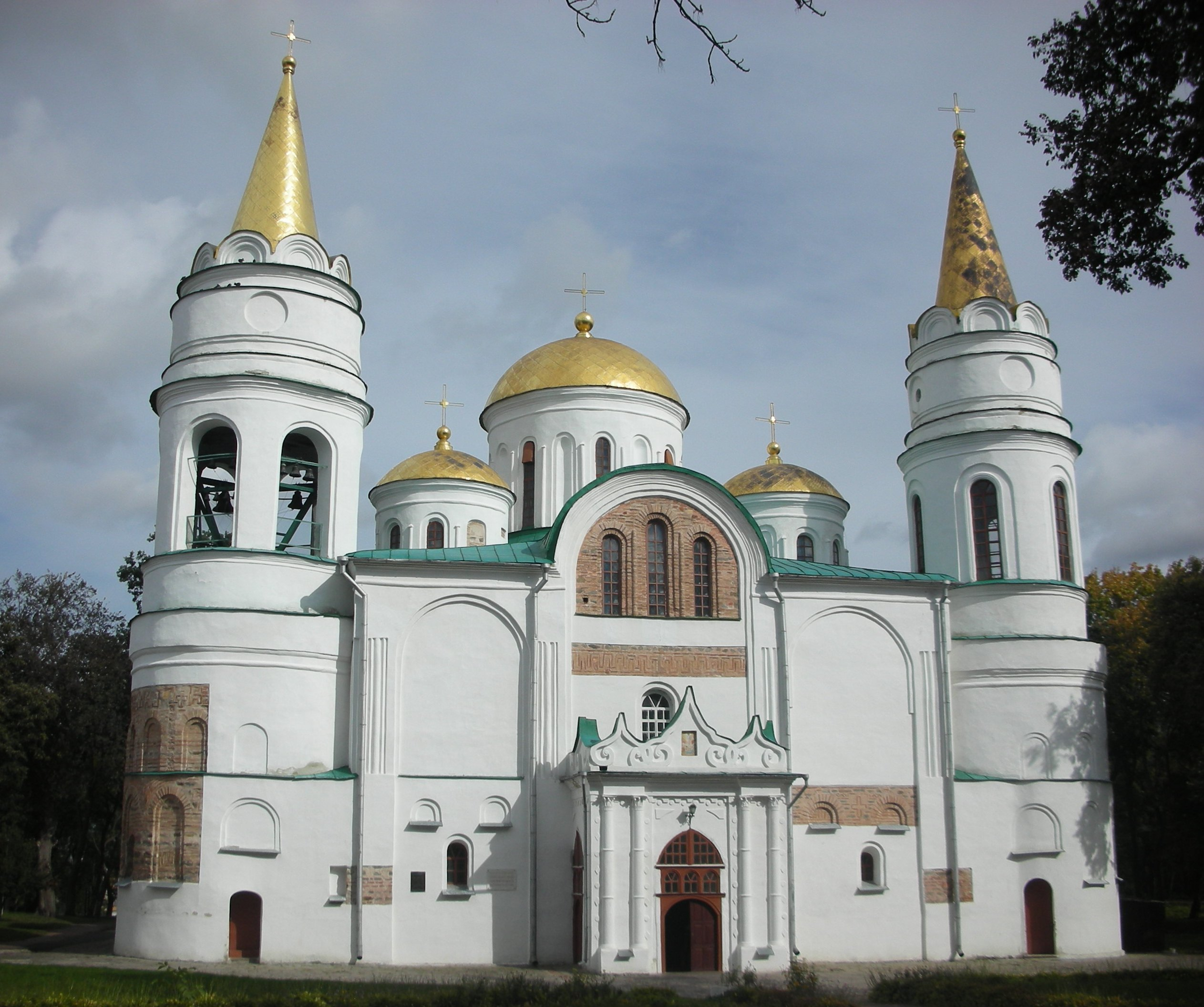 Спасо-Преображенський собор (мур.), Чернігів, Вал